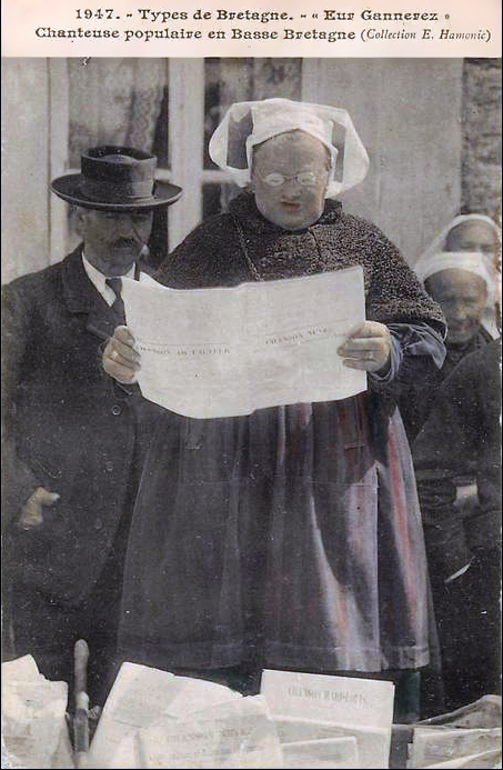 Cette carte montre en pleine action la plus connue des vendeuses de chansons, surnommée "Mari Kastellin" (Marie de Chateaulin) à cause de sa coiffe. Son véritable nom était Marie-Anne Rolland, femme de Jean Le Chalony, chiffonnier (leur mariage est daté du 3 juin 1879 à Châteaulin). Elle était née à Loqueffret le 6 août 1845 et exerçait la profession officielle de marchande foraine. Elle habitait Quimperlé mais n'hésitait pas à pousser jusque dans le Trégor ou le Pays Bigouden pour exercer son commerce. La date et le lieu de son décès ne sont pas connus mais elle était encore vivante en 1914. La feuille volante qu'elle tient dans les mains pourrait être un ensemble de trois chansons : Chanson nevez war sujet disput an eureujou/ Chanson ar Facteur/ Chanson Nevez - Eur Martolod trahisset gand e bried. La première chanson à pour auteur Yves Guillermic, vivant également à Quimperlé et dont il semble qu'il fut le compagnon de Mari Kastellin.